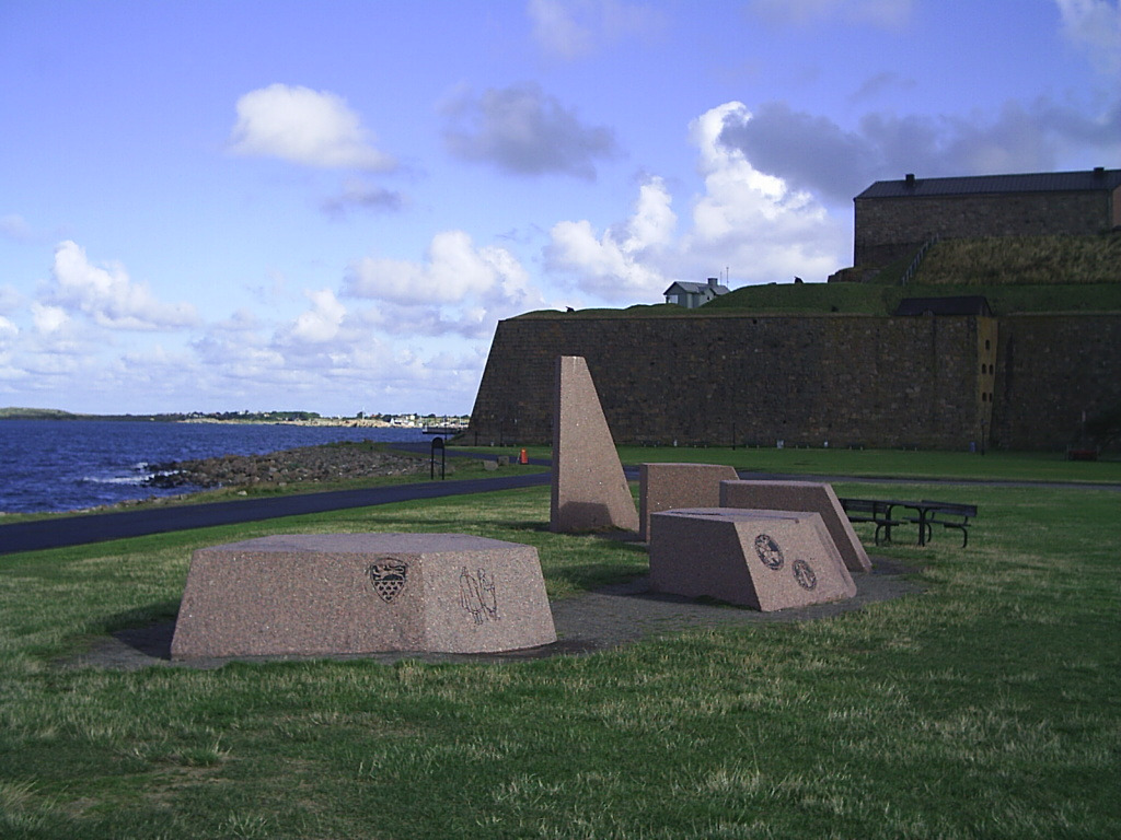 Minnesmärke i Varberg rest 15 augusti 1993 med anledning av att det var 650 år sedan kungavalet och fredsfördraget på "Varbergs slott" år 1343. Minnesmärket är gjort av den finske skulptören Harry Kivijärvi och visar bl.a. Bockstensmannen, flera hertigars, kungars och drottningars sigill, Heliga Birgitta och "Döden" (Digerdöden).